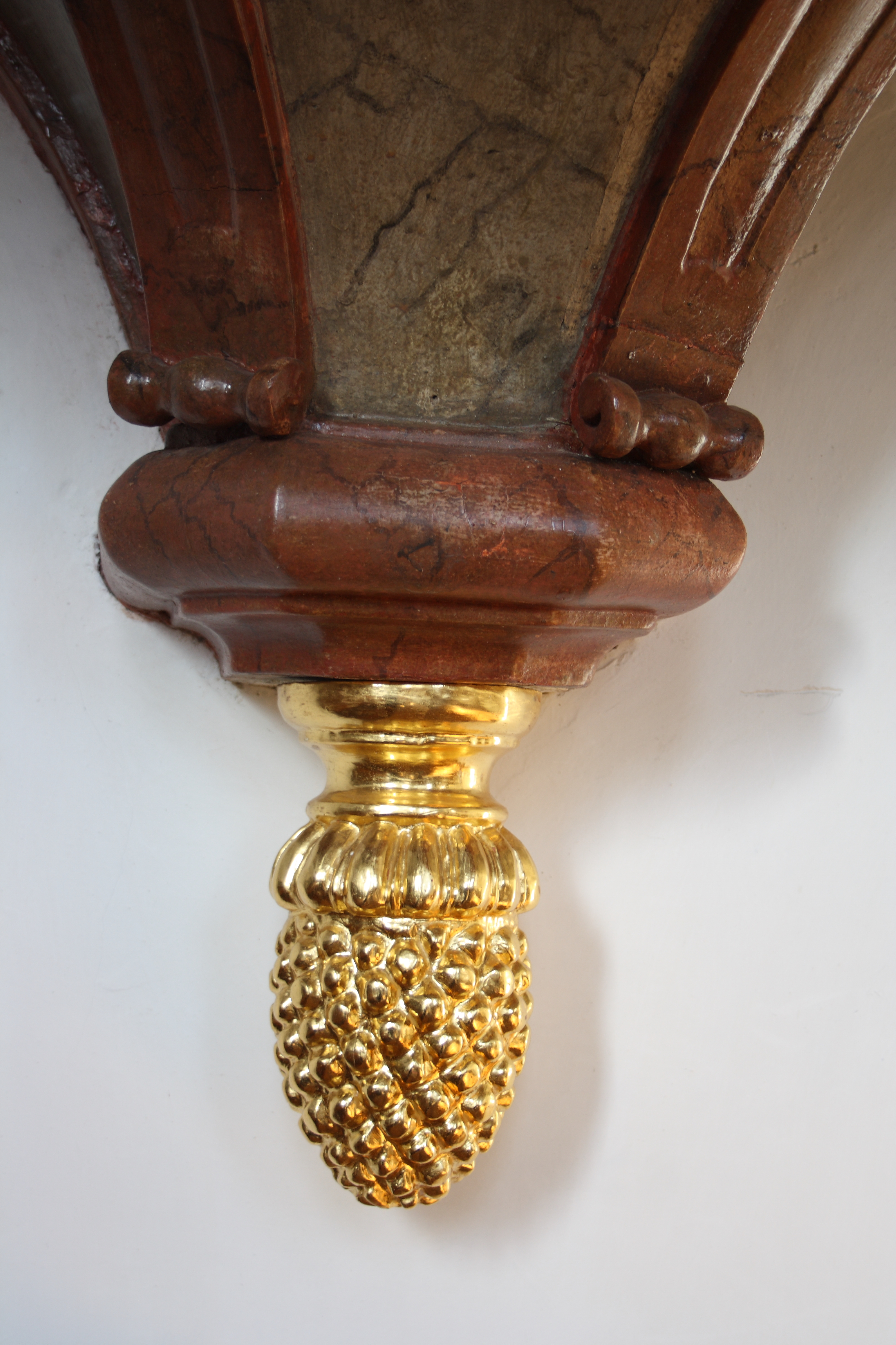 Katholische Pfarrkirche St. Michael in Oberbechingen, einem Ortsteil der Gemeinde Bachhagel im Landkreis Dillingen an der Donau (Bayern), Kanzel um 1760, aus der Werkstatt von Franz Karl Schwertle, Zirbelnuss am Kanzelfuß.